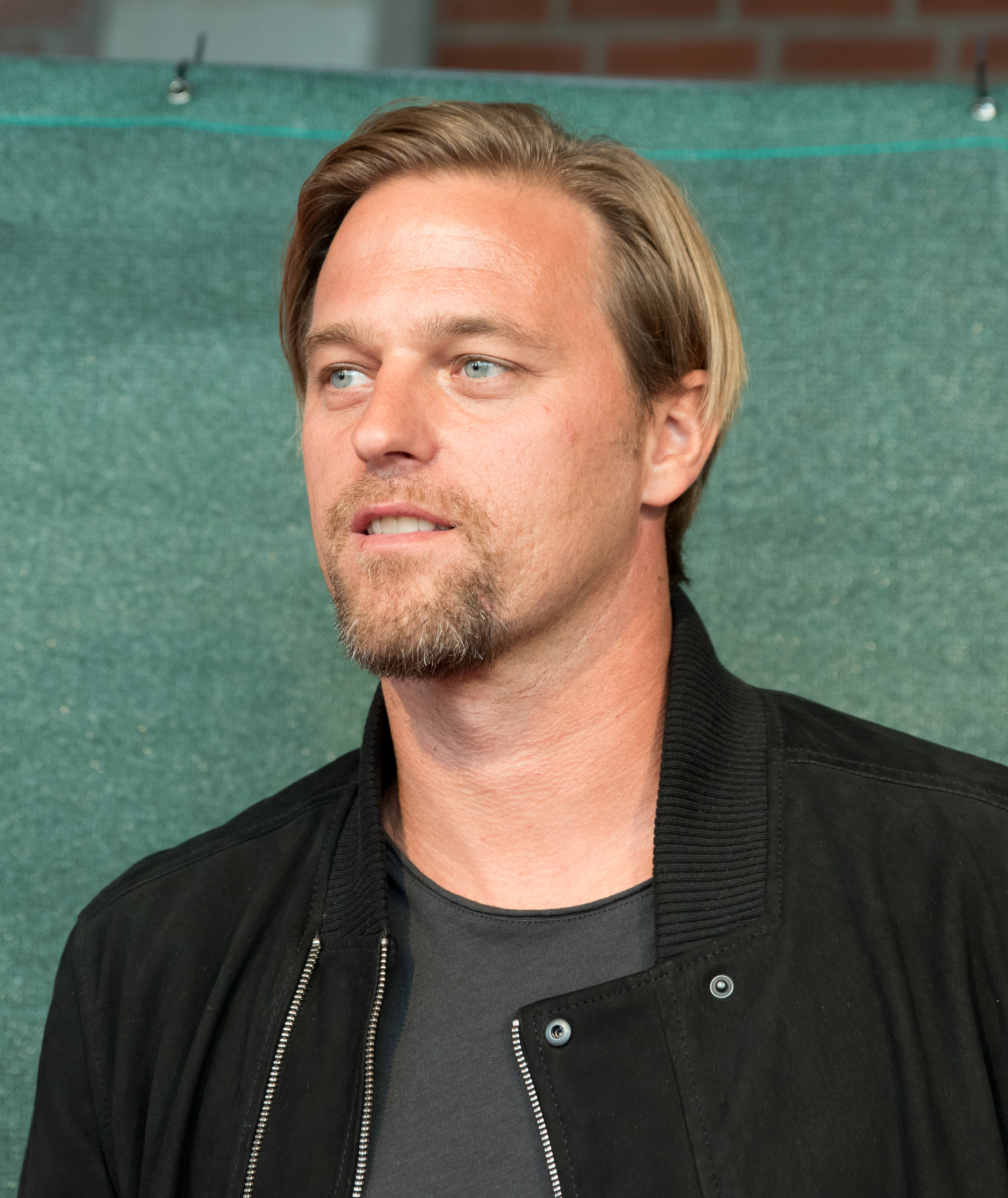 Timo Hildebrand beim Tag der Legenden 2016